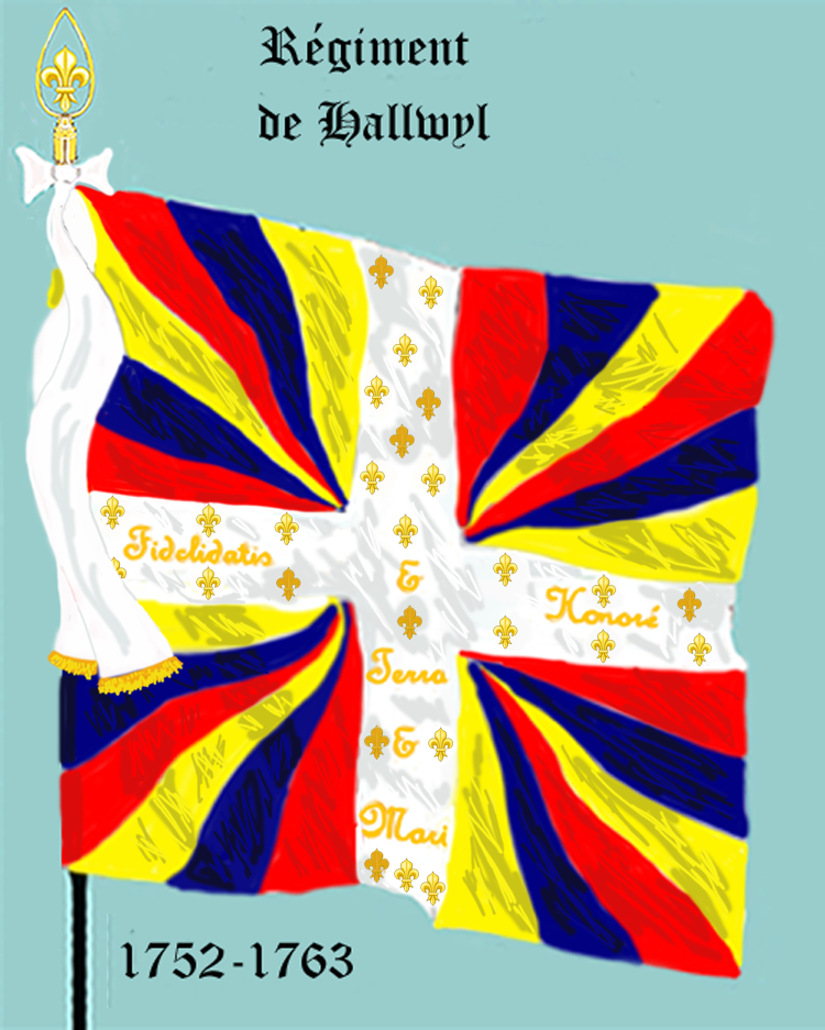 Ordonnanzfahne eines Fremdenregiments im königlich französischen Dienst. (Schweizer Regiment) - Entnommen und überarbeitet aus: „LES UNIFORMES ET LES DRAPEAUX DE L'ARMÉE DU ROI“ Marseille 1899. - Drapeau d'Ordonnance d' un régiment étranger au service française (régiment suisse.)